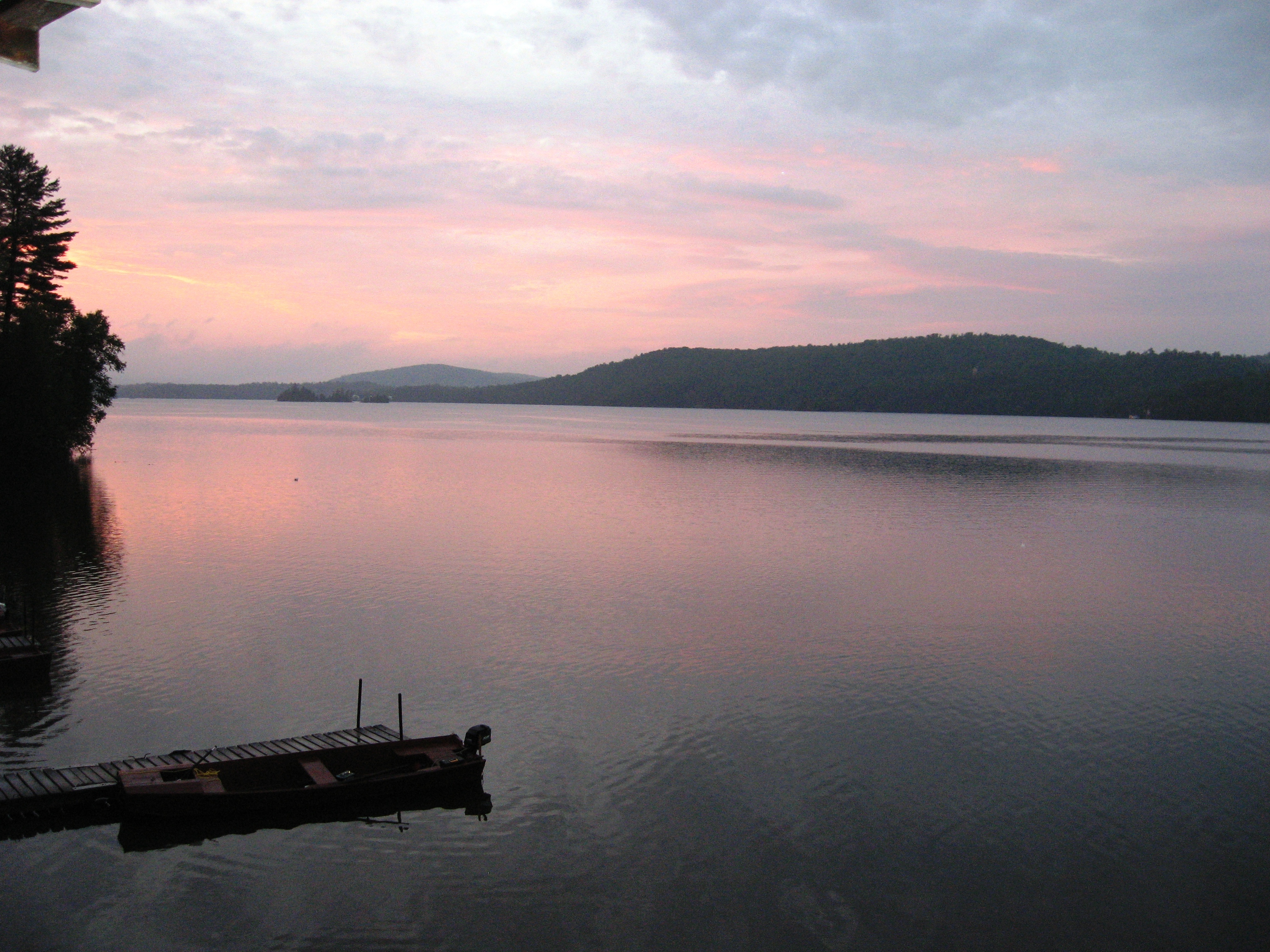 Coucher de soleil au Lac des Îles, à Saint-Aimé-du-Lac-des-Îles, dans la MRC d'Antoine-Labelle, dans les Laurentides, au Québec.